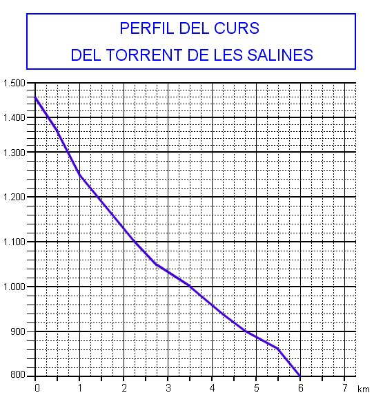 Perfill del curs del torrent de les Salines (Solsonès)